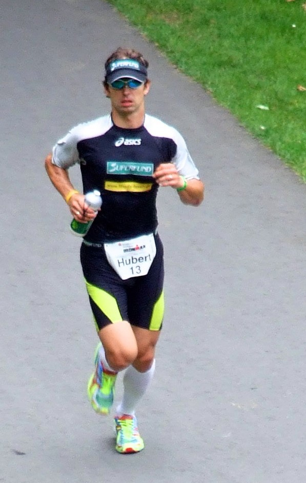 Hubert Hammerl (17.) beim Ironman 2007 Frankfurt